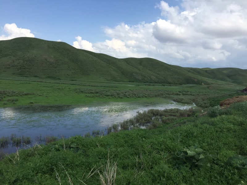 Жазғы табиғат